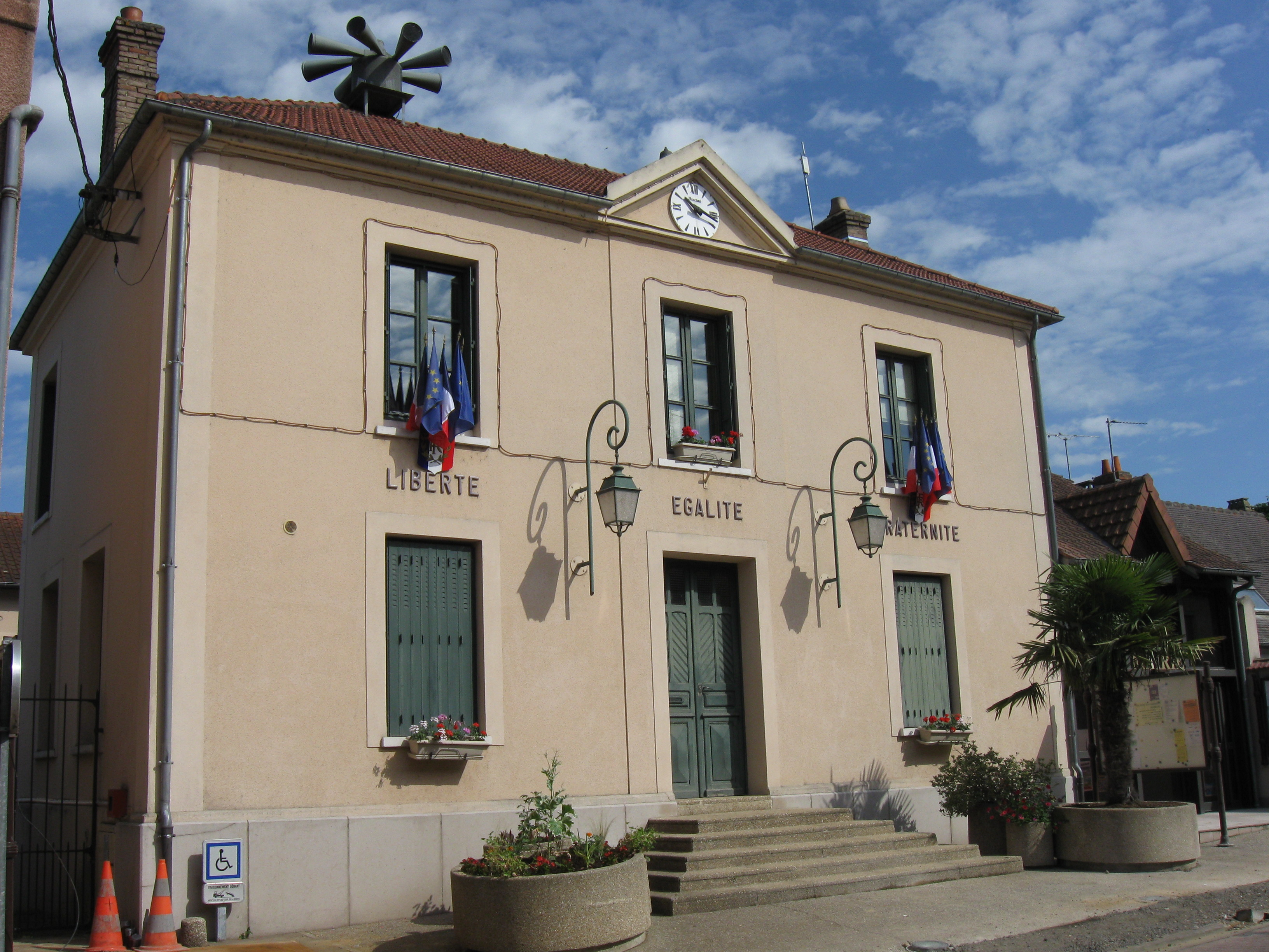 Mairie de Freneuse. (département des Yvelines, région Île-de-France).